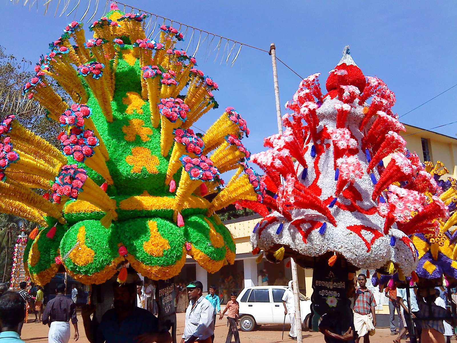 ചീരക്കുഴി ഷഷ്ടി മഹോല്‍സവത്തിനിടെ എടുത്ത ചിത്രം.